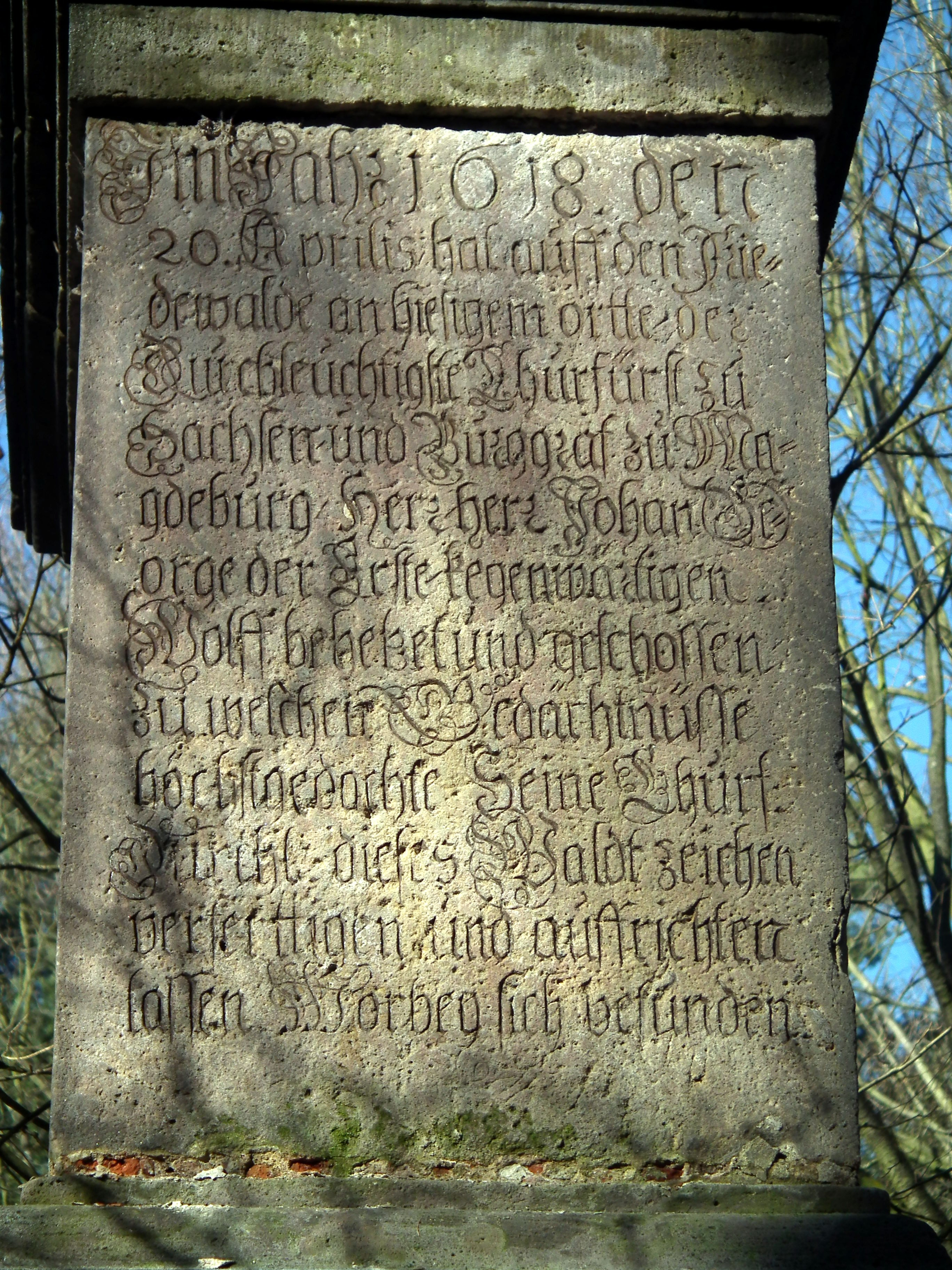 Wolfssäule Friedewald, Weinböhla, Sachsen, Deutschland